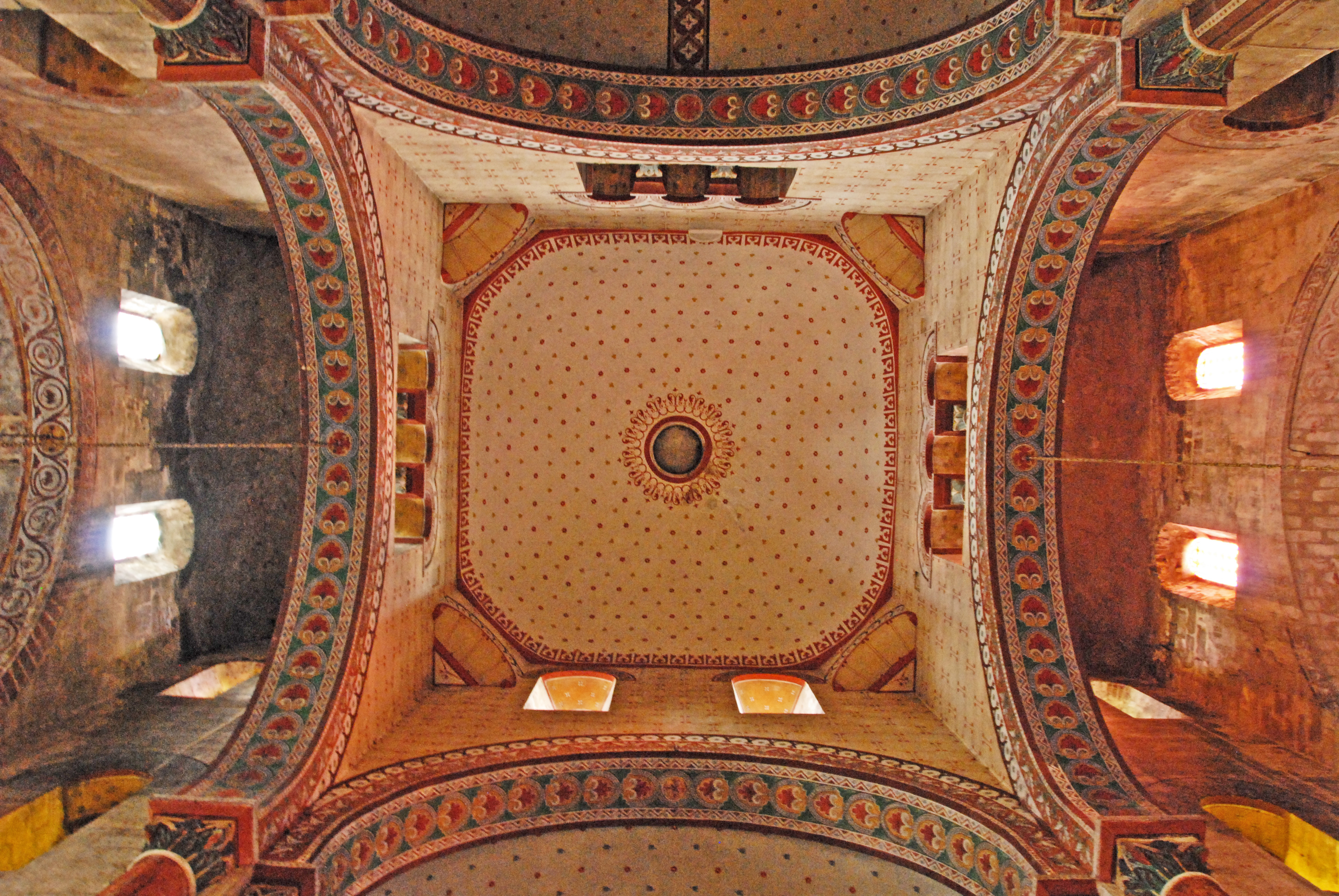 Trompenkuppel + massif barlong